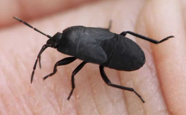 Nymphe von Aellopus atratus am 24.8.2017 in der Schwetzinger Hardt